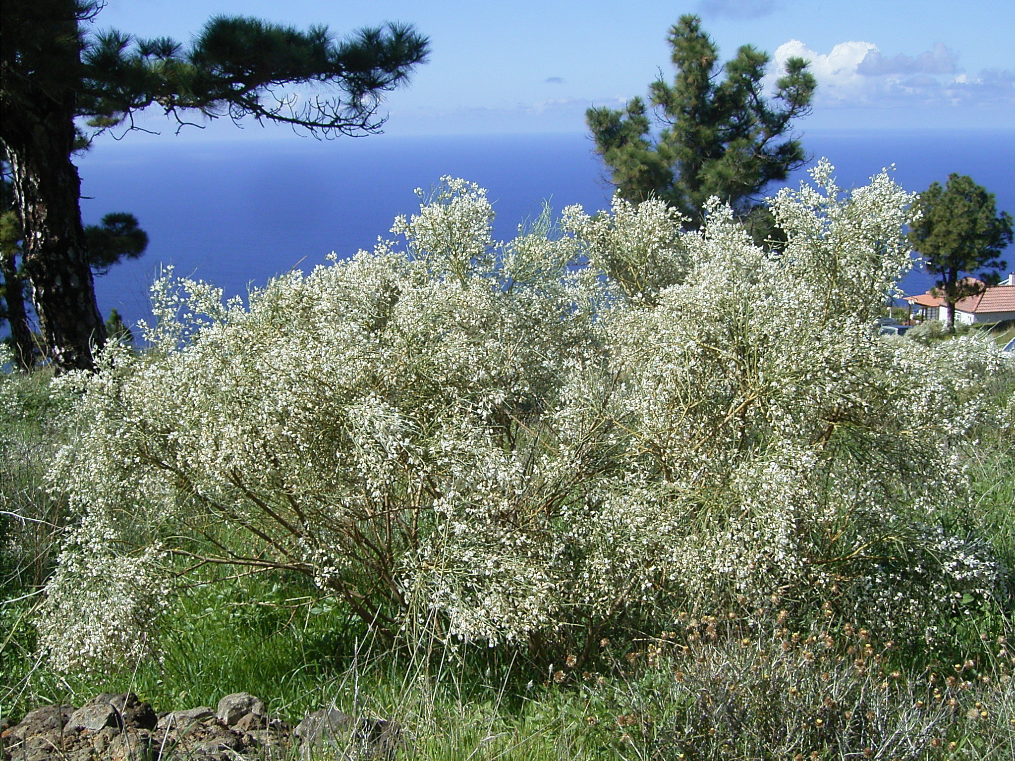 Retama raetam growing in Puntagorda, La Palma, Canary Islands